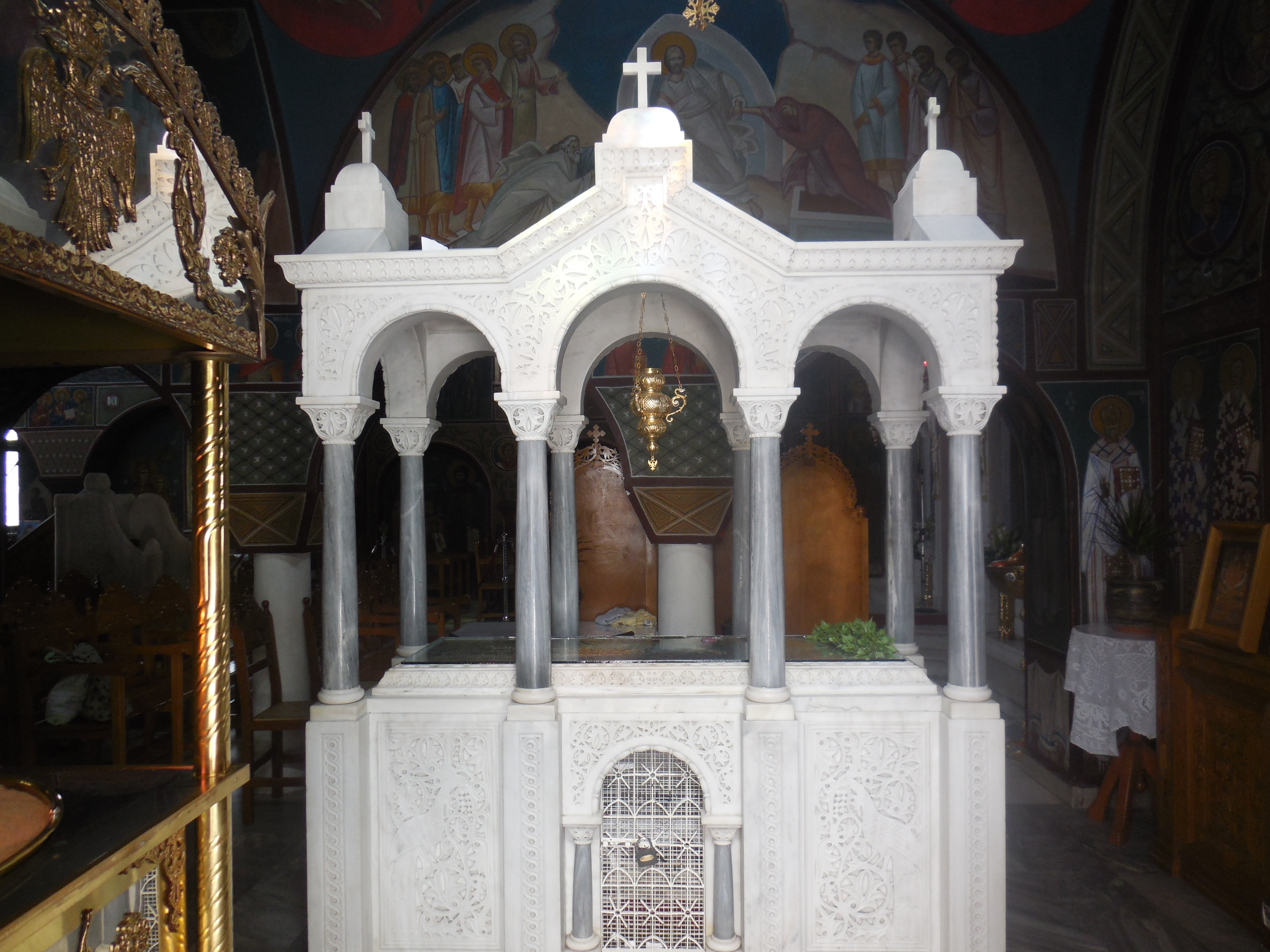 Мощи святого Рафаила